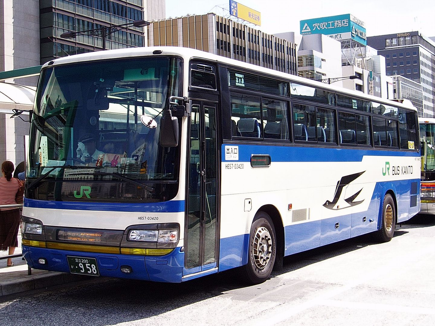 JR Bus Kanto H657-03420 Hino KL-RU4FSEA at Tokyo Sta.